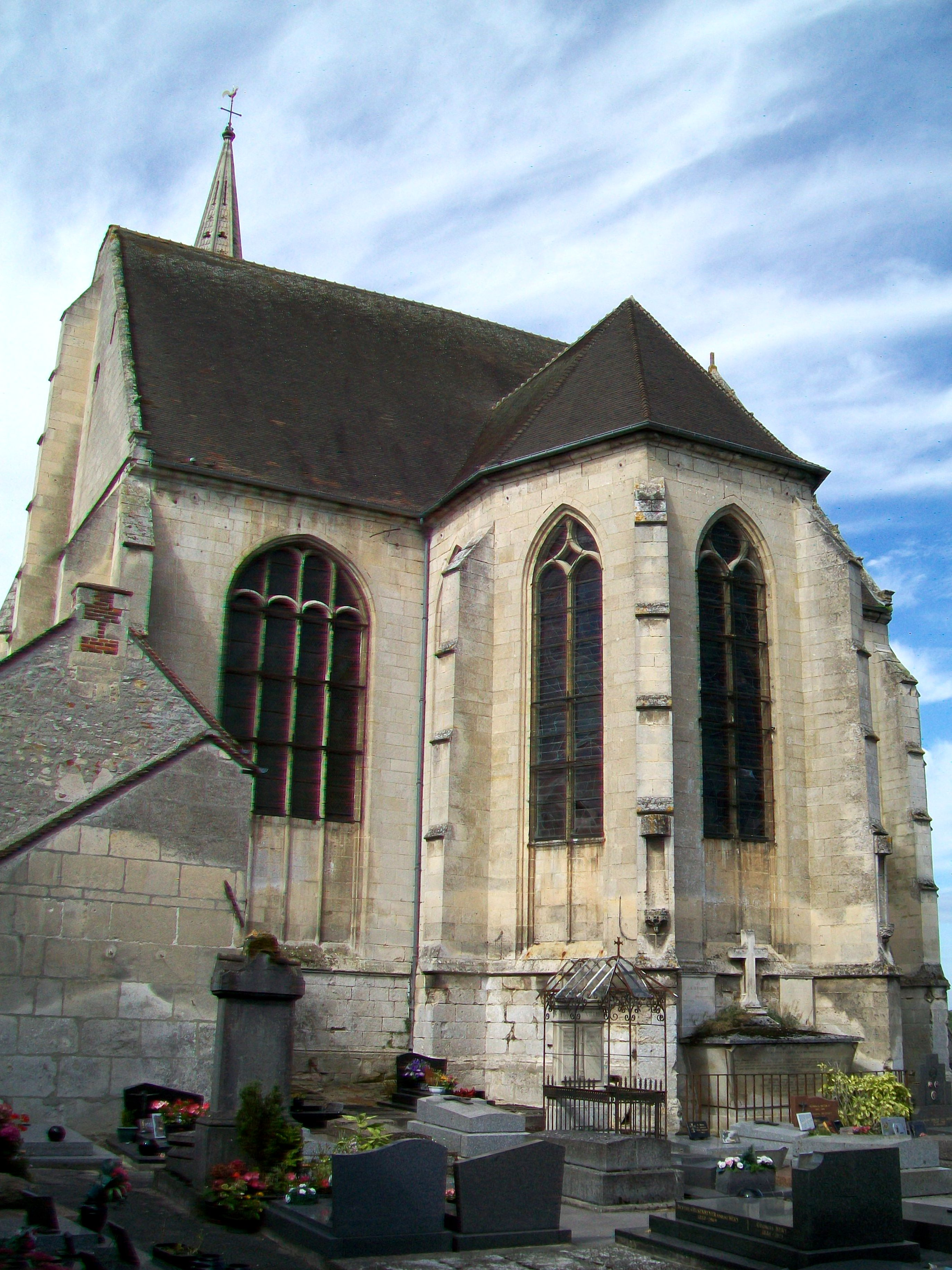 Le chœur, donnant sur le cimetière.